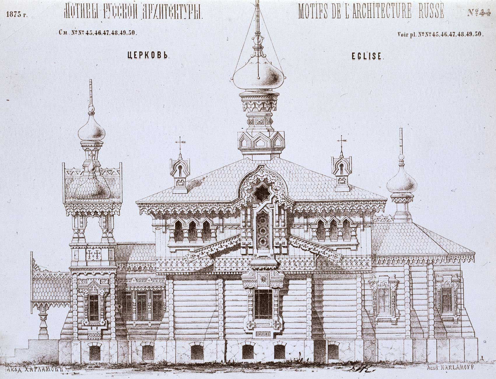 Проект церкви Святого Ильи в Знаменке